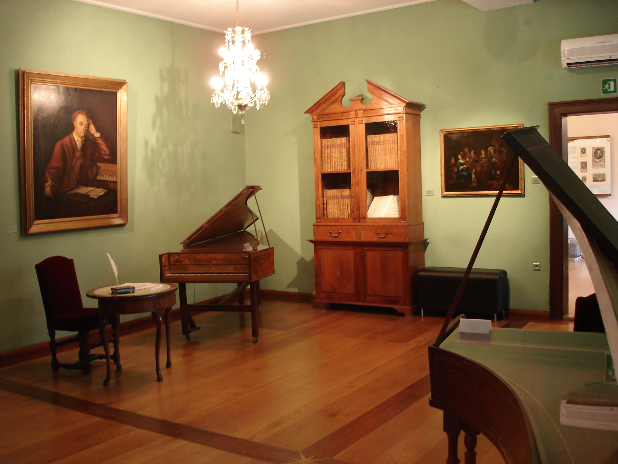 Raum des Händelhauses in Halle (Saale)